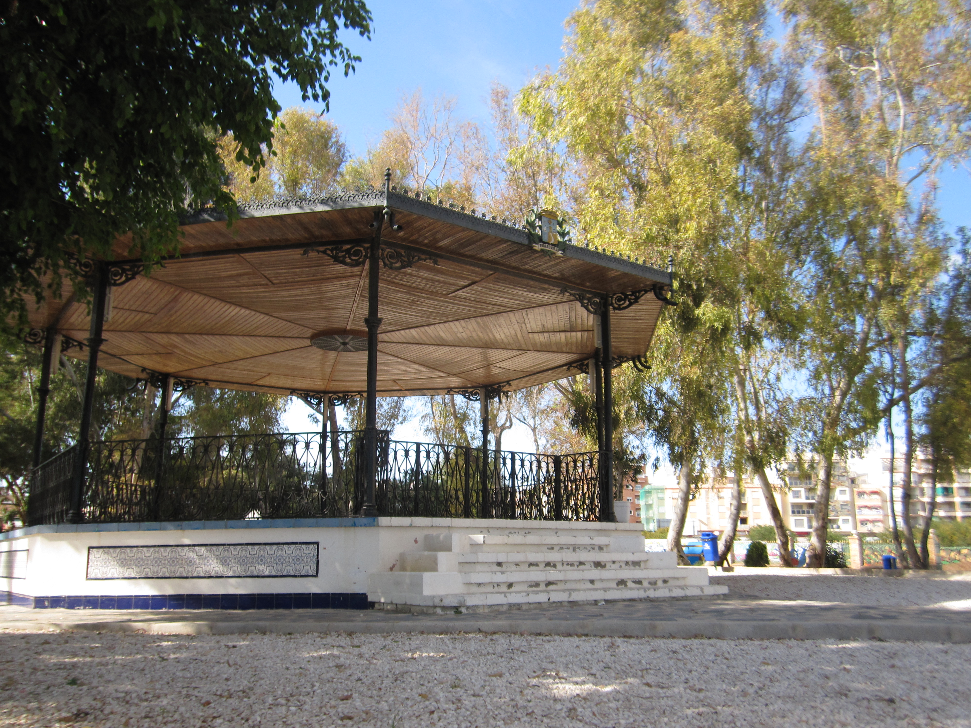 Parque de Doña Sinforosa. Clásico templete de la ciudad de Torrevieja.